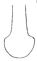 fungi stem